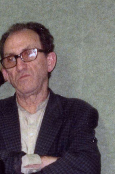 Le peintre algérien Ahmed Kara-Ahmed, vers 1992